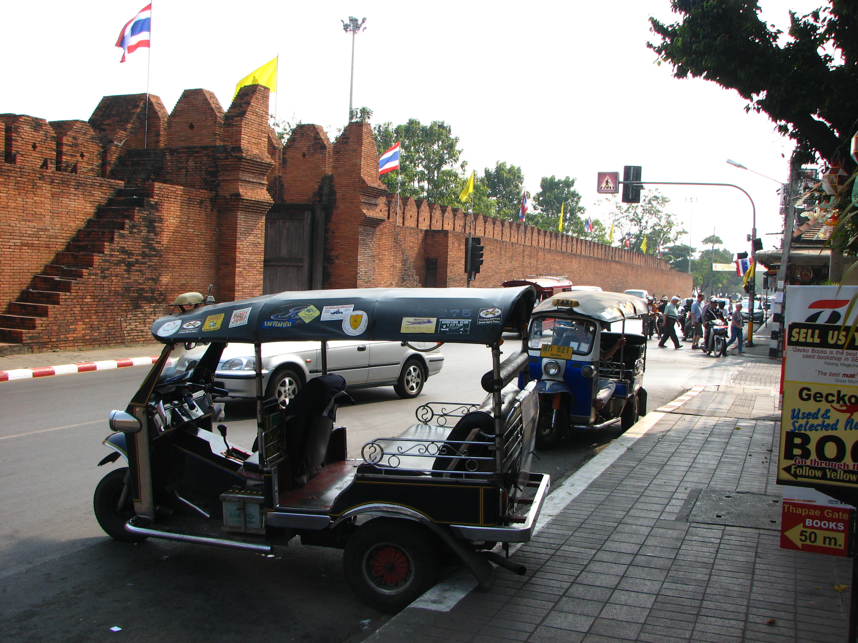 Tuk-tuk waiting for passengers in Chiang Mai